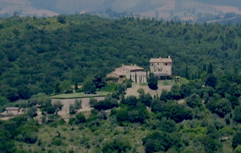 Panorama verso il Castello di Vicarello (GR)